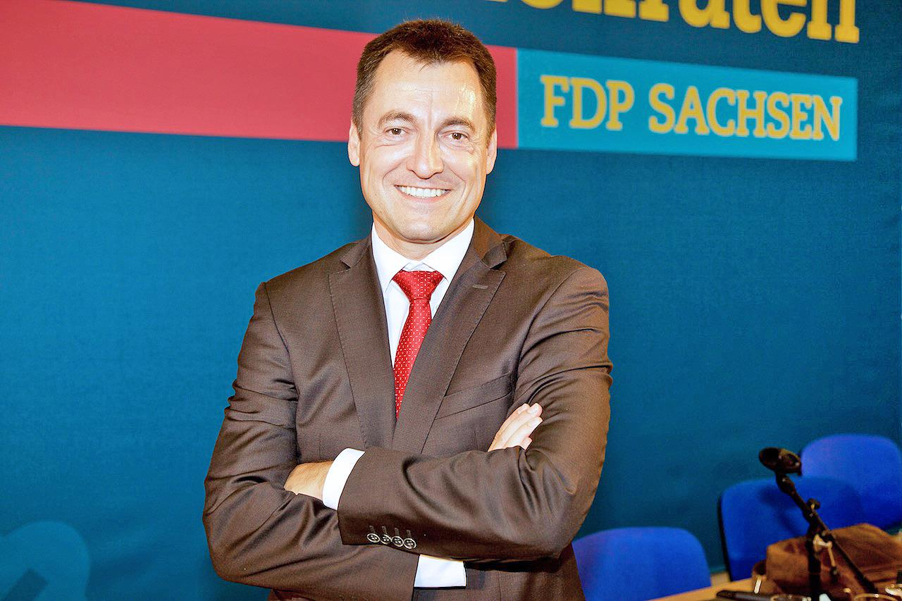 Torsten Herbst ist seit dem 27. September 2017 Mitglied des Deutschen Bundestages. Er zog für die FDP Sachsen über die Landesliste (Platz 1) ein.